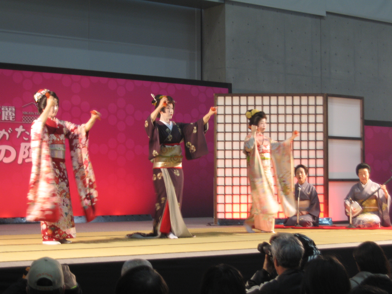 酒の陣。特設ステージで『新潟小唄』を踊る古町芸妓。